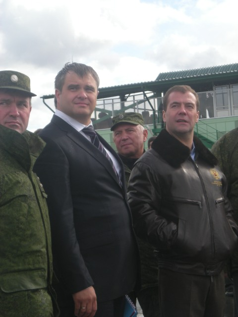 Стратегические учения «Центр-2011» на Чебаркульском полигоне